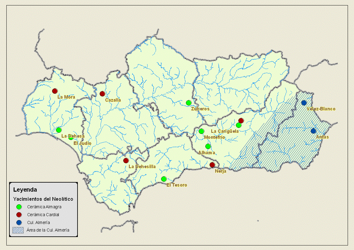 Principales Yacimientos del Neolítico en Andalucía